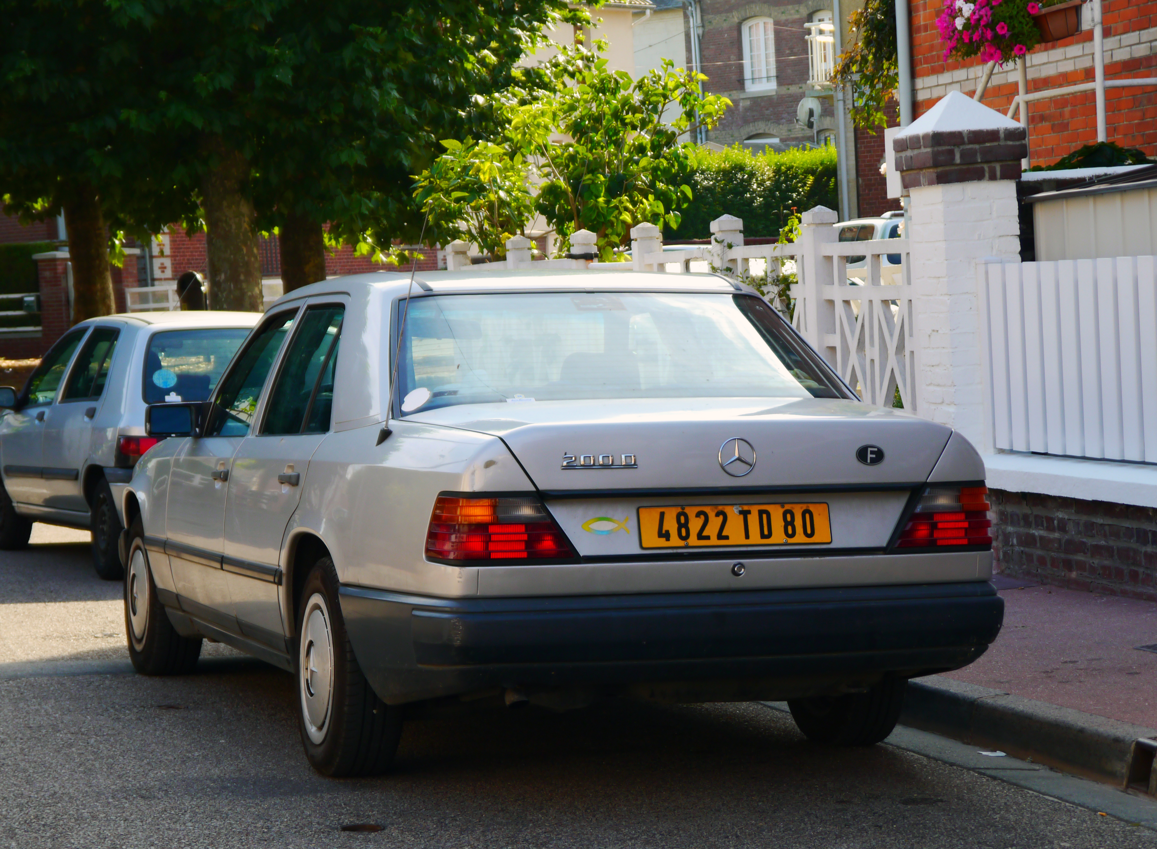 1991 Mercedes-Benz 200D saloon - 2.0L diesel engine (54 kW; 72 bhp).